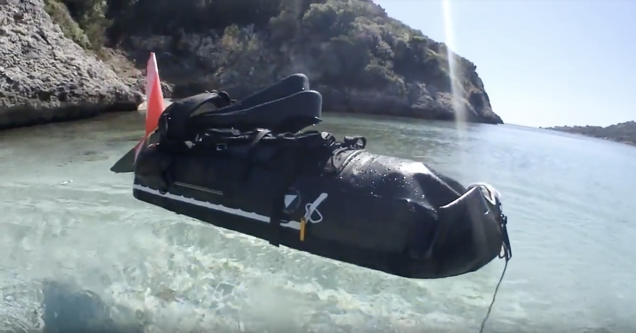 Sac étanche gonflable pour le seatrekking